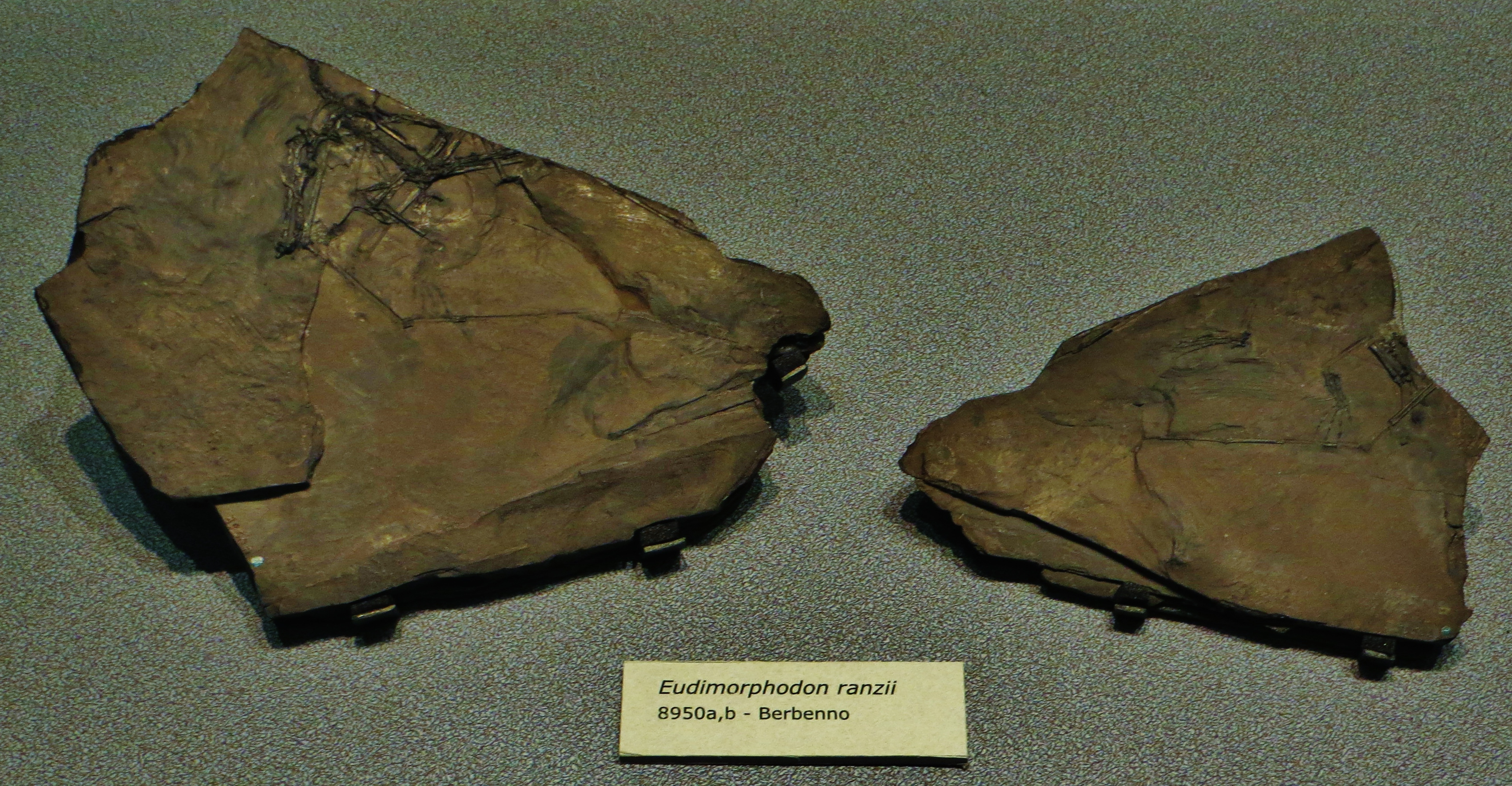 Fossil of Eudimorphodon, an extinct reptile- Took the picture at Museo di Scienze Naturali, Bergamo